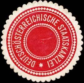 Sealing stamp Title: Deutschösterreichische Staatskanzlei Description: rot, weiß, geprägt Place: Wien size: 4 cm